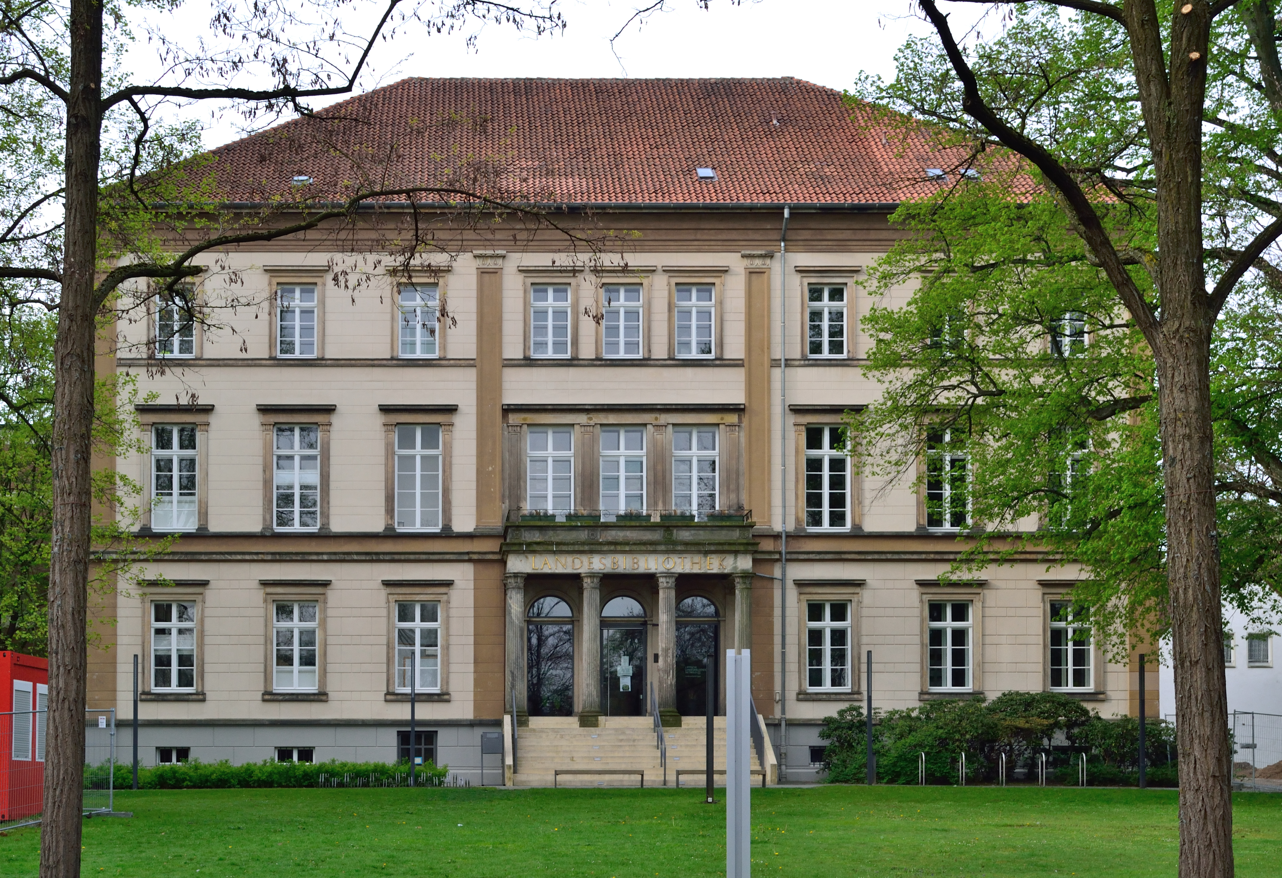 Baudenkmal Detmold Nr. 7 - Lippische Landesbibliothek (ehemaliges Prinzenpalais) Hornsche Straße 41